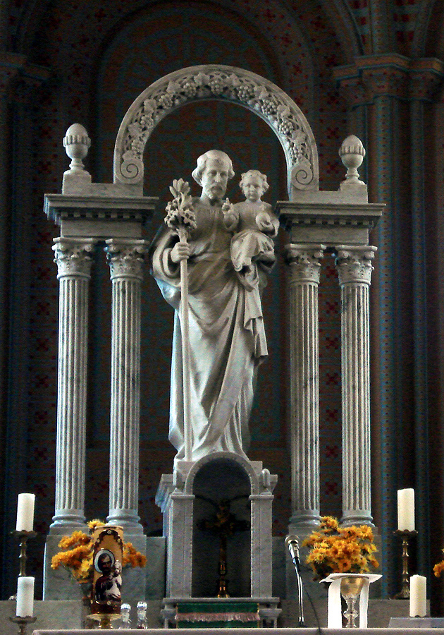 Interior da Igreja São José, Porto Alegre, Brasil. Altar-mor com imagem de São José de autoria de André Arjonas